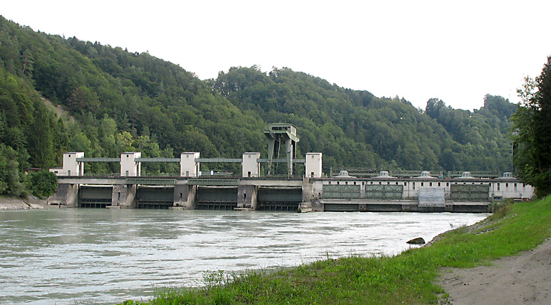 Laufwasserkraftwerk Teufelsbruck (Gemeinde Soyen, Landkreis Rosenheim, Bayern, Deutschland), Inn-Staustufe. Blickrichtung: flußaufwärts (südost).